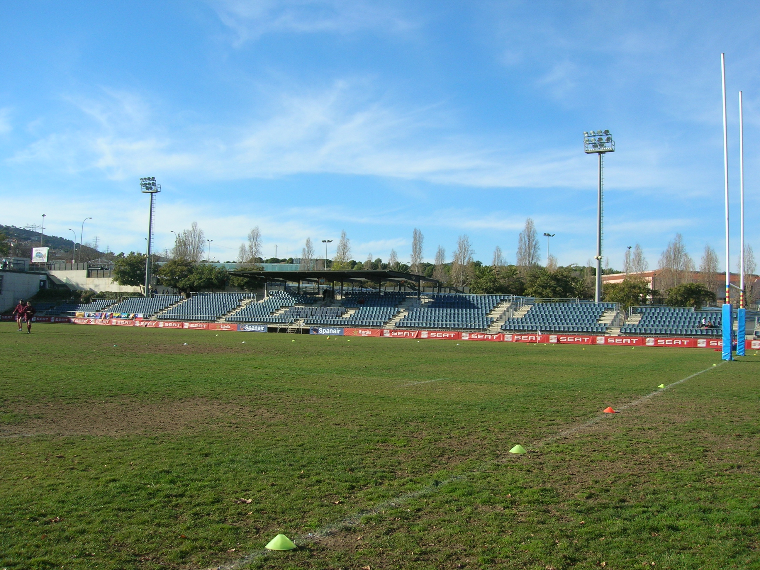 Estadio de rugby Baldiri Aleu. Sant Boi de Llobregat